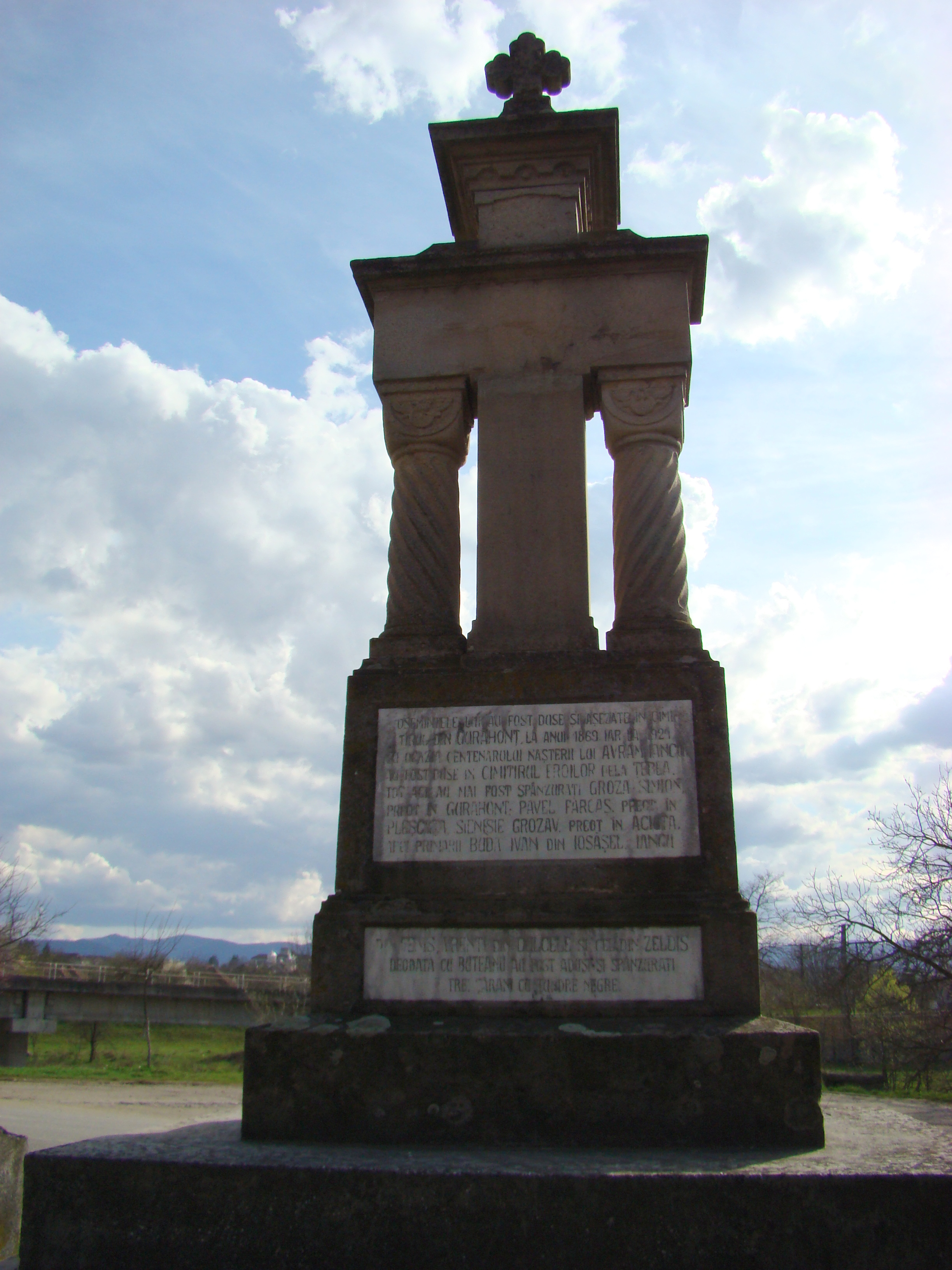 Troiţa lui Ioan Buteanu, strada Iosăşel; sat GURAHONŢ